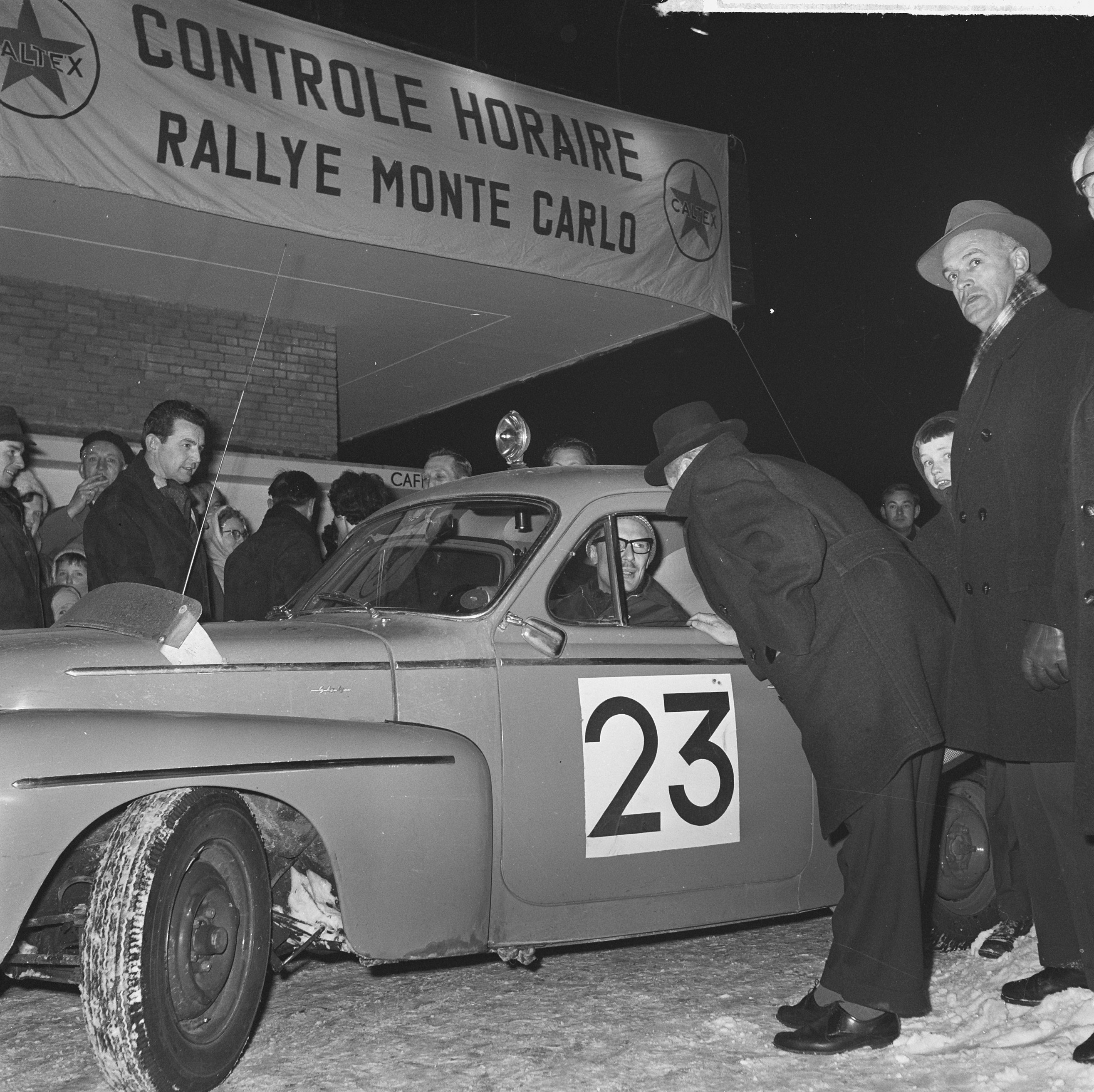 Collectie / Archief : Fotocollectie Anefo Reportage / Serie : [ onbekend ] Beschrijving : 32e Rally Automobille Monte Carlo , Linschoten-Huisman Datum : 20 januari 1963 Fotograaf : Nijs, Jac. de / Anefo Auteursrechthebbende : Nationaal Archief Materiaalsoort : Negatief (zwart/wit) Nummer archiefinventaris : bekijk toegang 2.24.01.03 Bestanddeelnummer : 914-7299